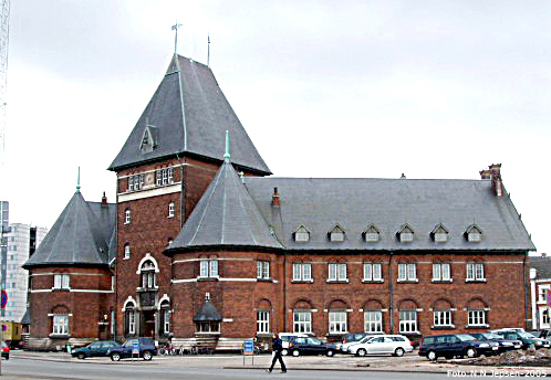 da: Toldboden i Århus, tegnet af arkitekt Hack Kampmann, my foto en: Custom House in Århus, designed by Danish architect Hack Kampmann.